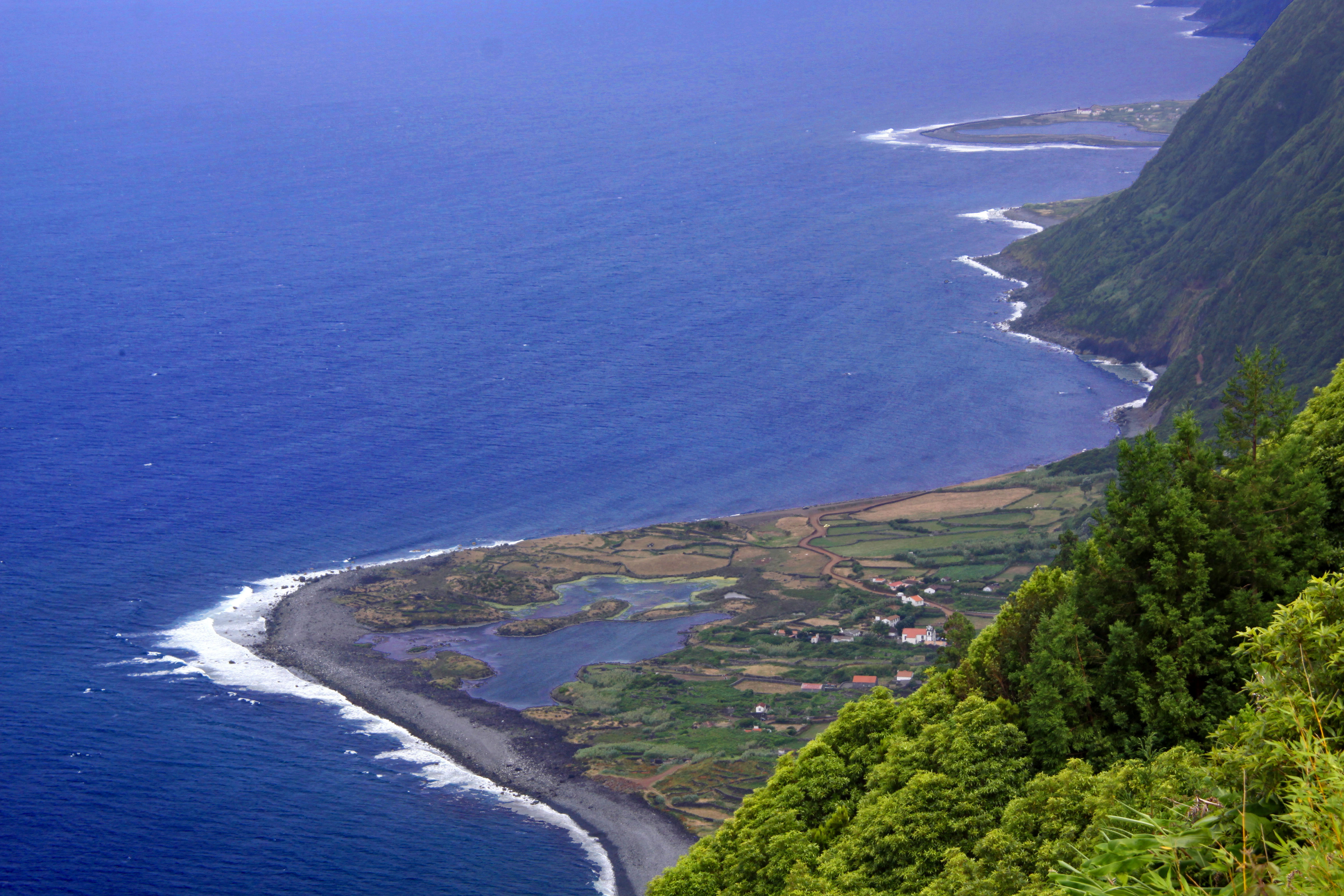 Ilha de São Jorge, Açores. Vue sur les fajãs dos Cubres et da Caldeira de Santo Cristo.